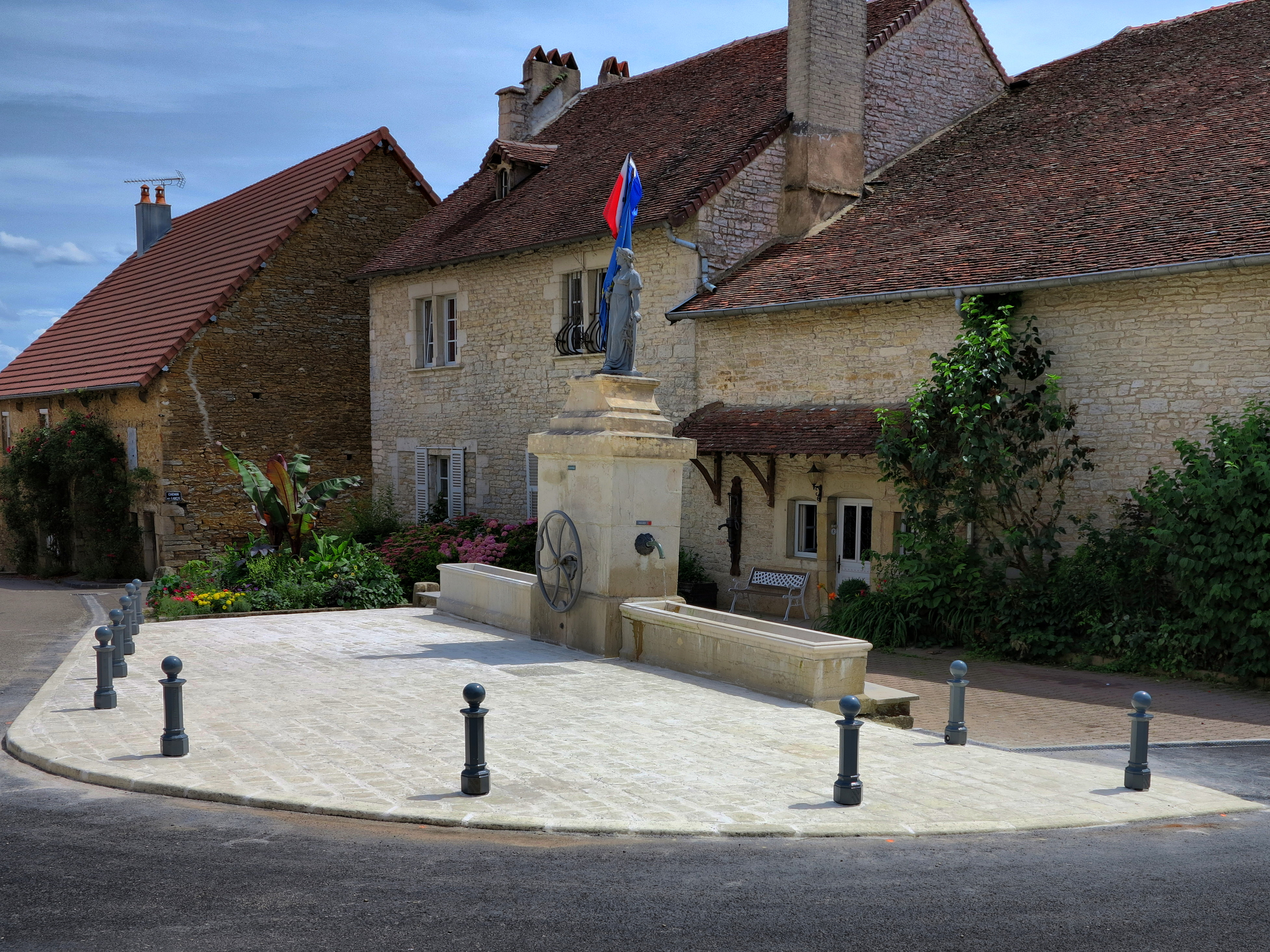 La fontaine-abreuvoir